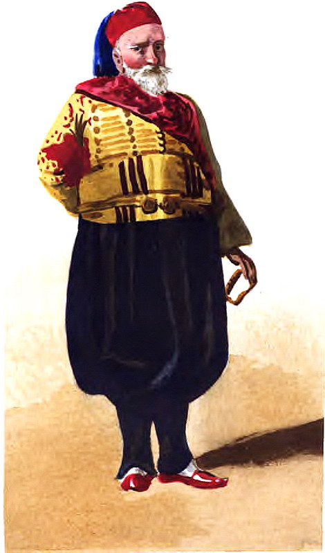 Ibrahim Pacha, aquarelle de Prosper Mérimée